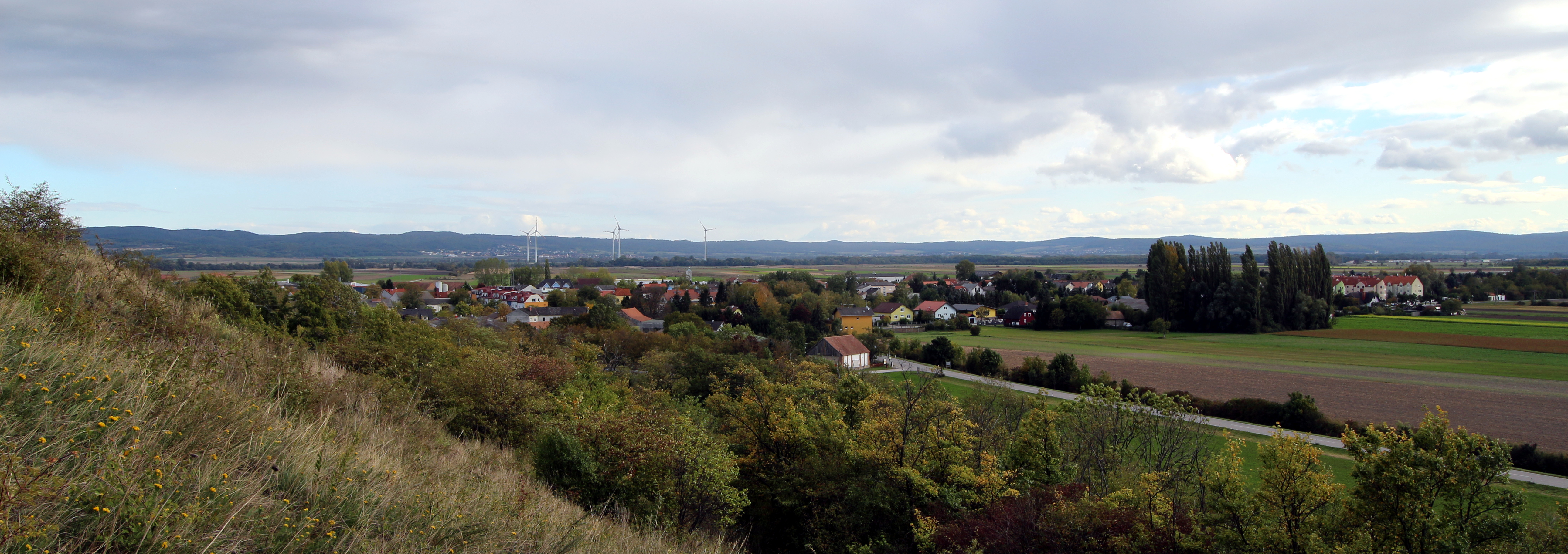 Sicht vom Goldberg auf die Gemeinde Reisenberg in Niederösterreich. Blickrichtung Süden.